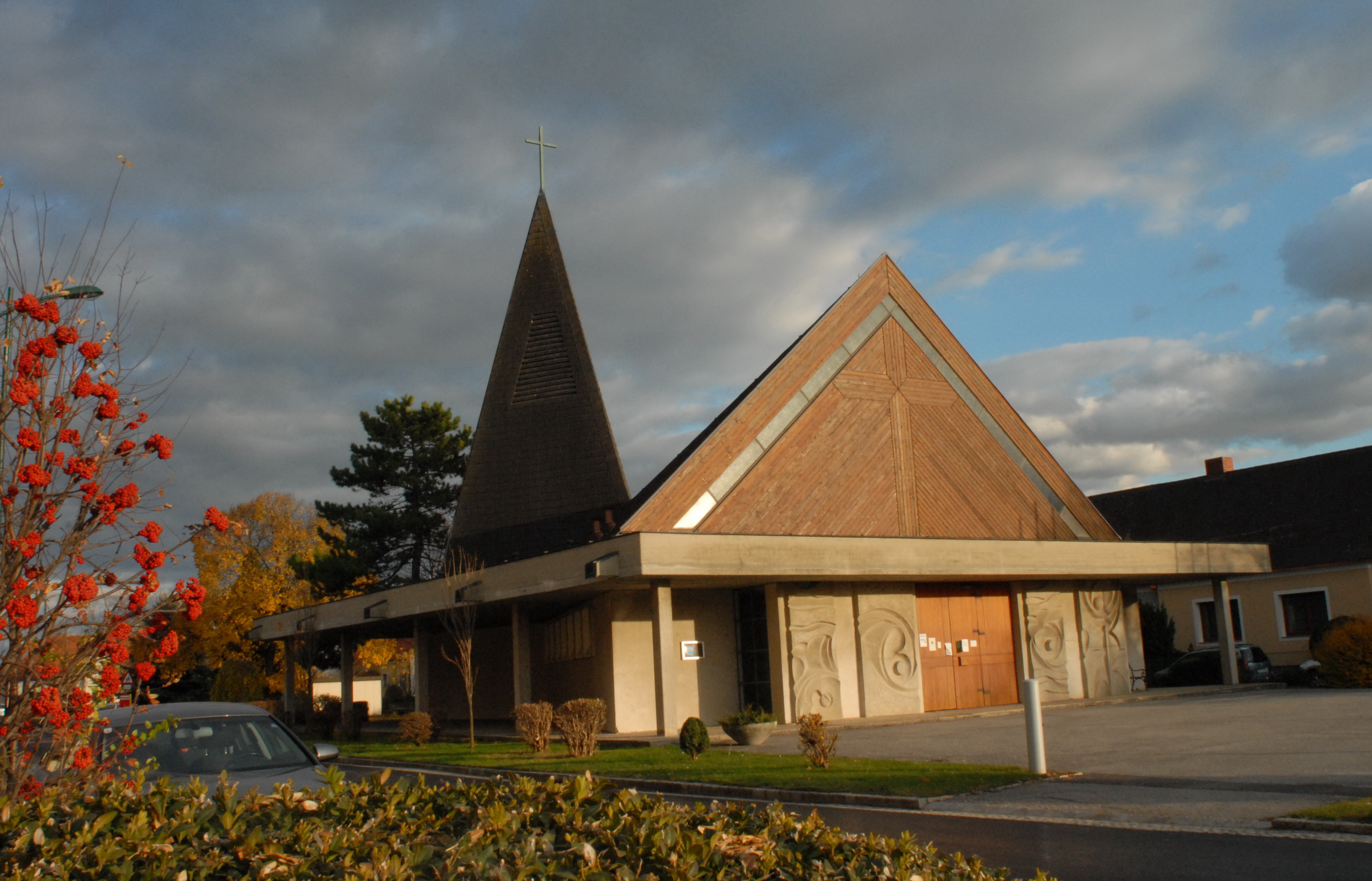 Die dreieckige Form des Grundrisses und der Längsschnittes lässt alle sichtbaren Linien im Altarraum konvergieren und erhöht die Konzentration. Der ebenfalls dreieckige Turm durchdringt das Dach und bildet über dem Altar einen Baldachin, gleichzeitig Blendschutz gegen das von oben auf den Opfertisch niederflutende Licht. Die Kirche steht auf dem schmalen Dorfanger.